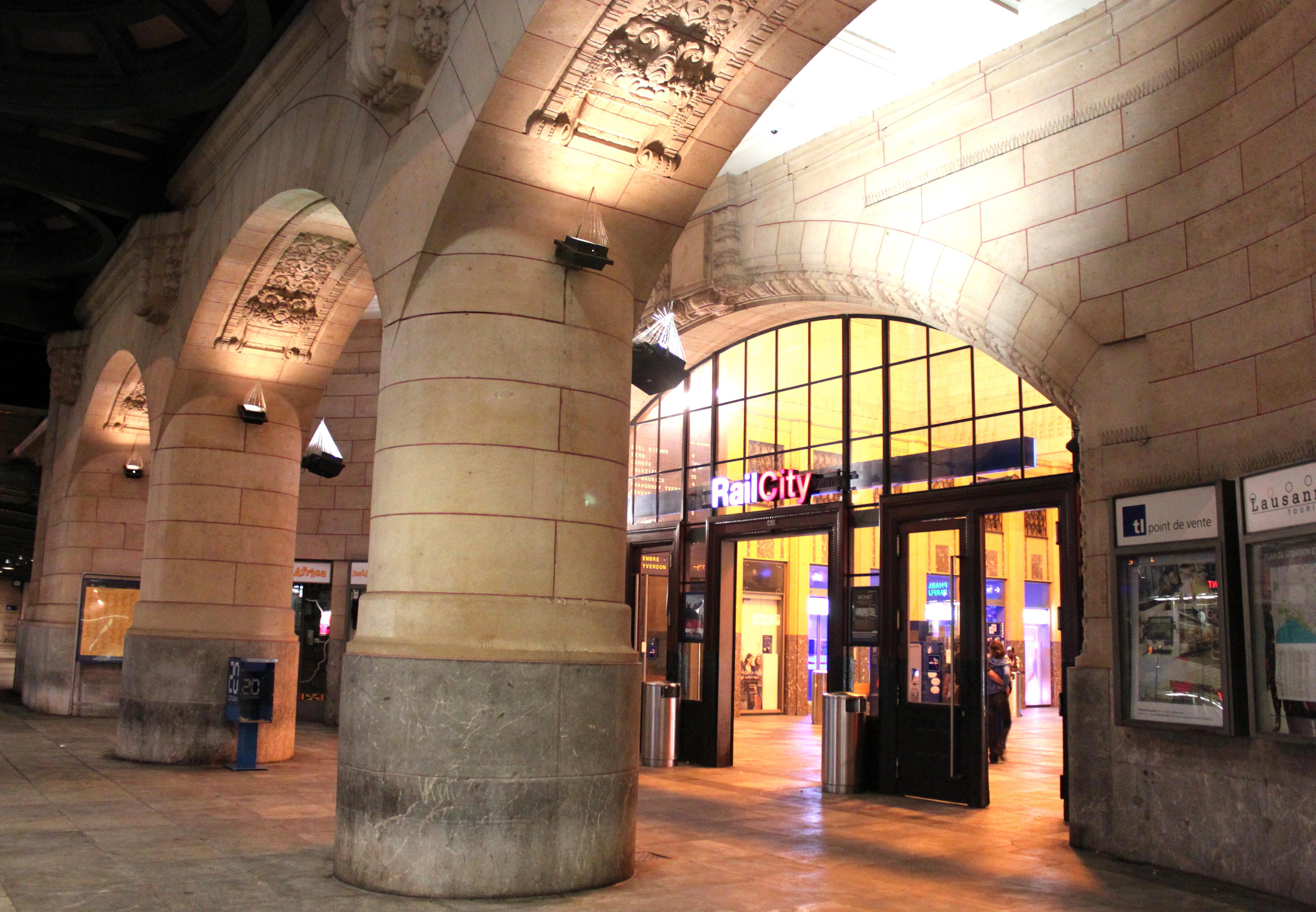 Suisse, canton de Vaud, Lausanne, Gare.